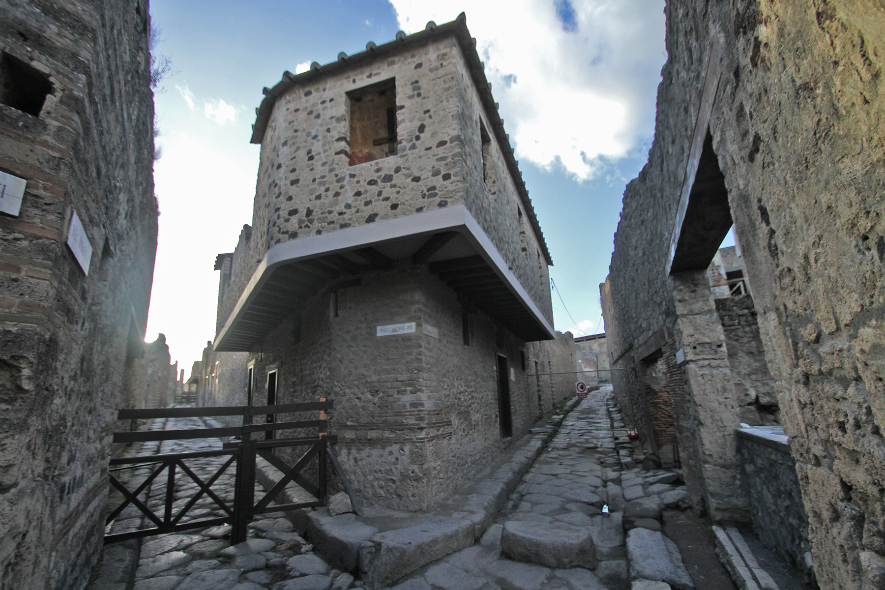 Pompei 5234